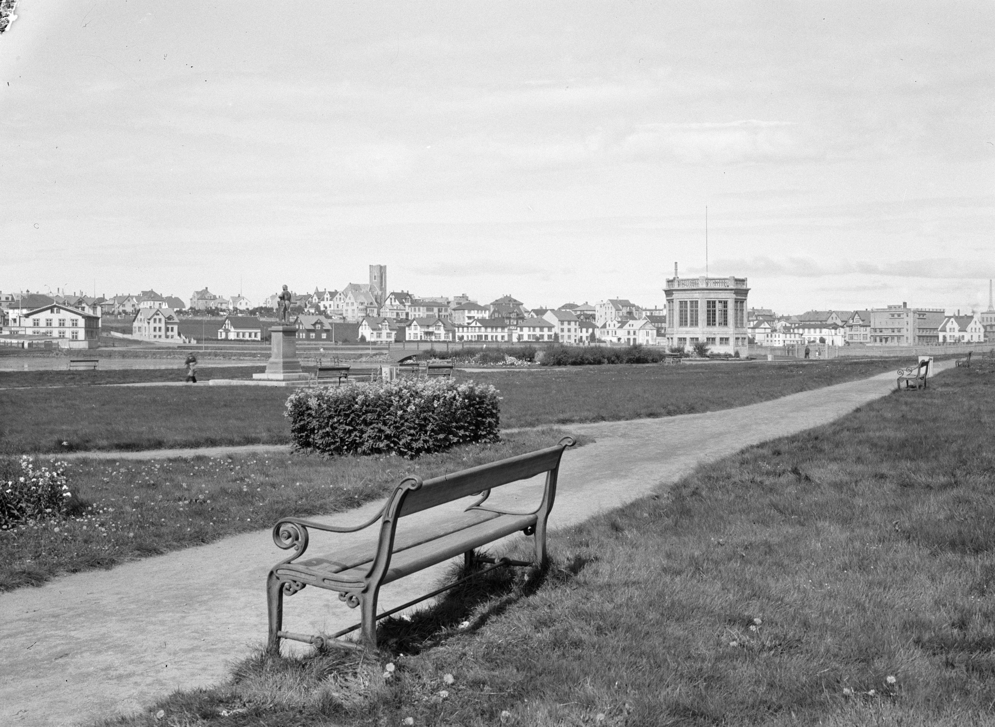 Collectie / Archief : Fotocollectie Van de Poll Reportage / Serie : IJsland Beschrijving : Geicht op Reykjavik vanuit het stadspark. In het midden een standbeeld voor de Deense beeldhouwer Thorwaldsen met links daarvan de rooms-katholieke kathedraal Datum : 1934 Locatie : IJsland, Reykjavik Trefwoorden : beeldhouwers, parken, stadsbeelden, standbeelden, zitbanken Persoonsnaam : Thorvaldsen, Bertel Fotograaf : Poll, Willem van de, [onbekend] Auteursrechthebbende : Nationaal Archief Materiaalsoort : Glasnegatief Nummer archiefinventaris : bekijk toegang 2.24.14.02 Bestanddeelnummer : 190-0393